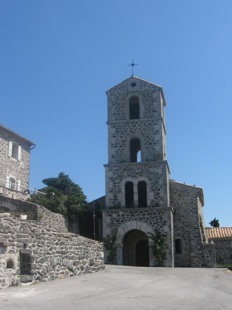 Eglise